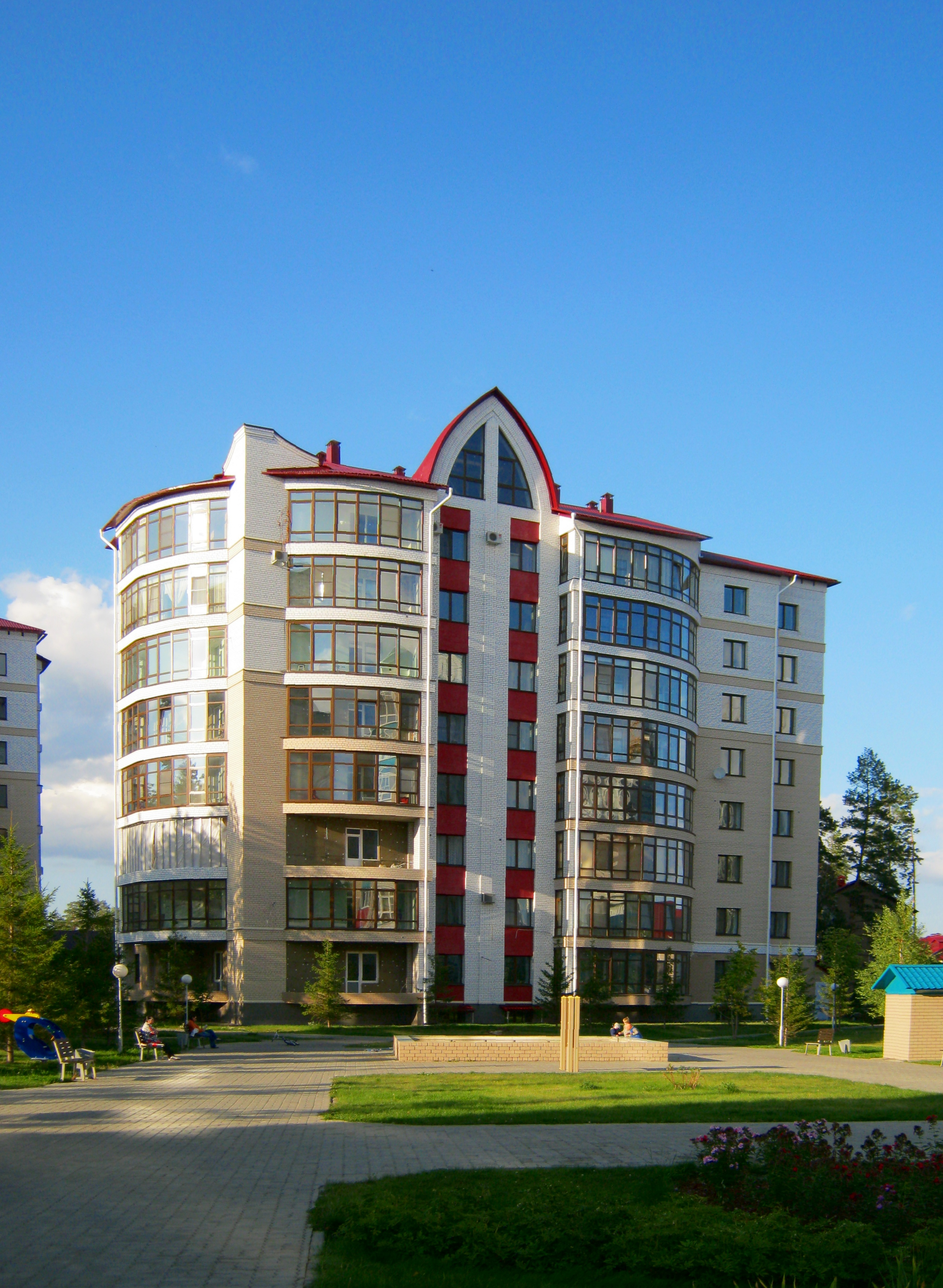 Барнаул, Змеиногорский тракт, жилой дом